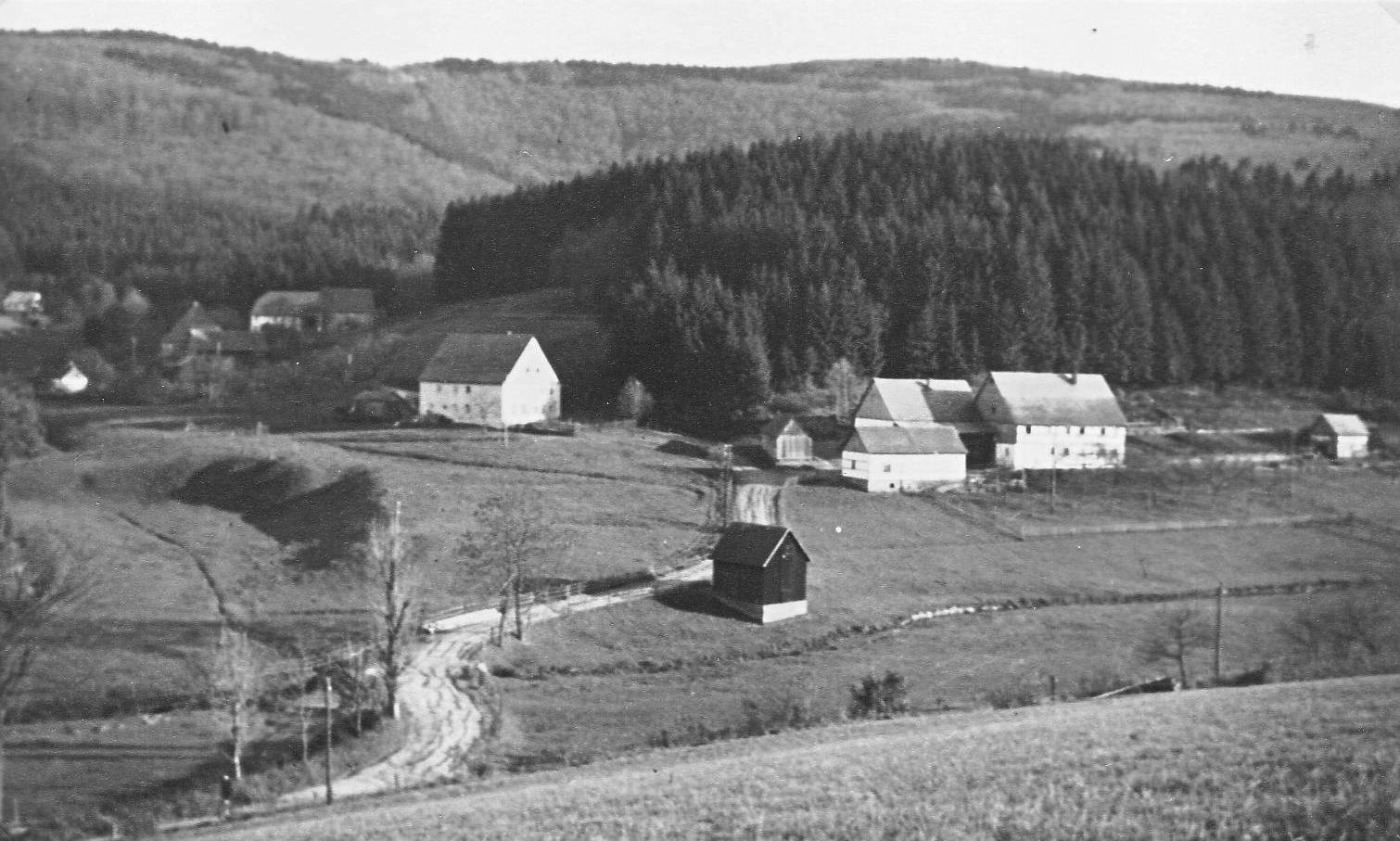 Bestwig-Untervalme in den 1930er Jahren von Westen aus gesehen.